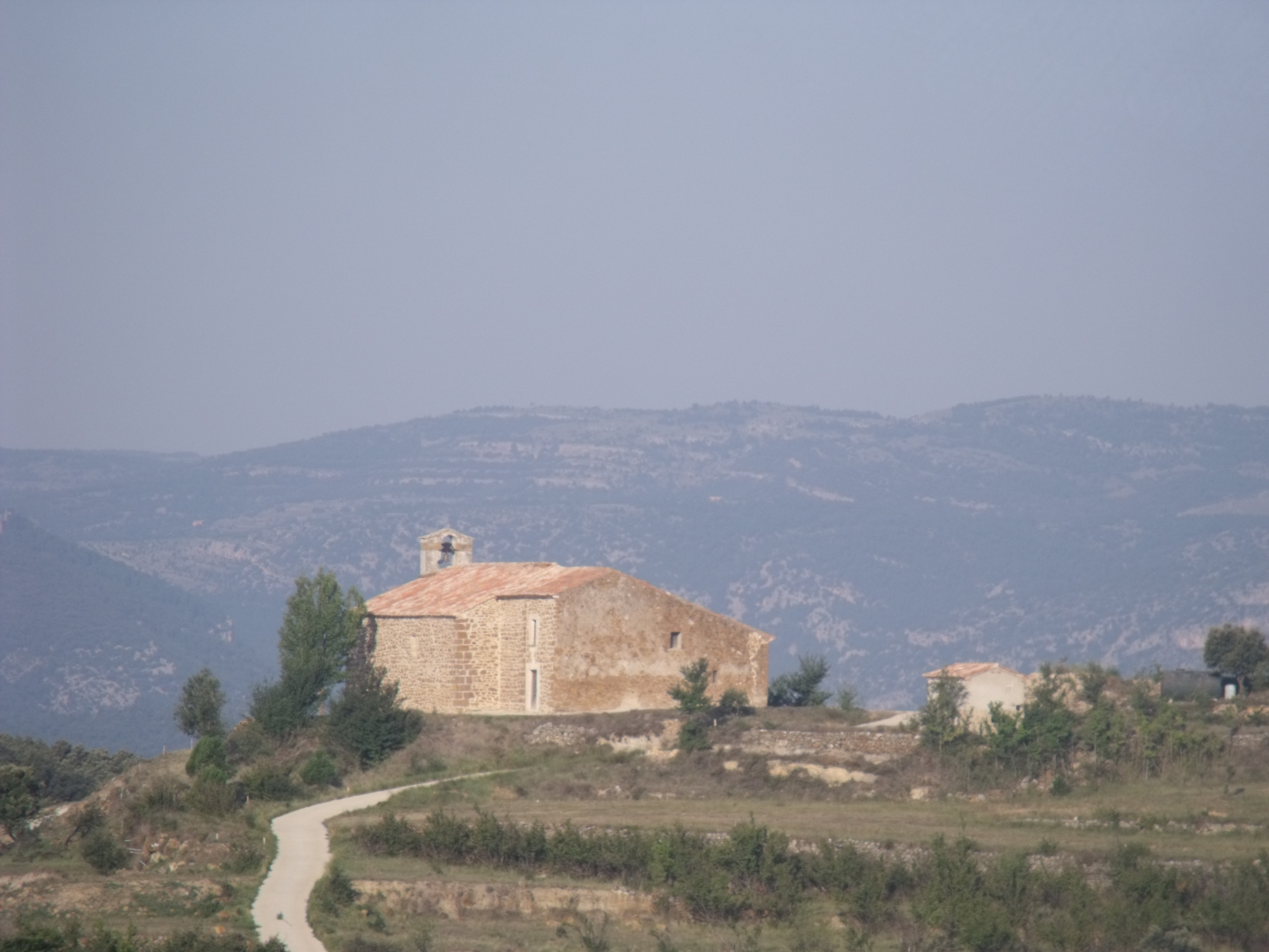 Ermita de Sant Roc.